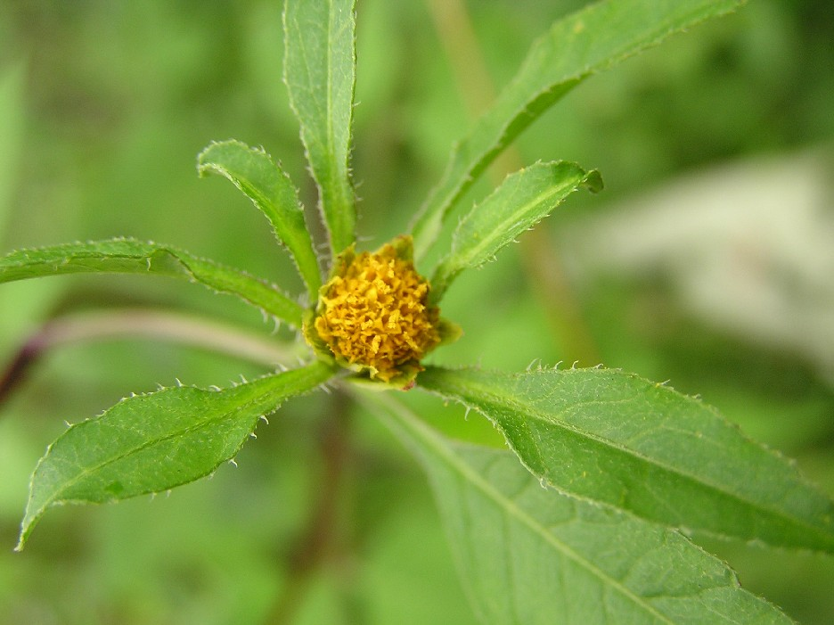 Bidens frondosa am Bonner Rheinufer.